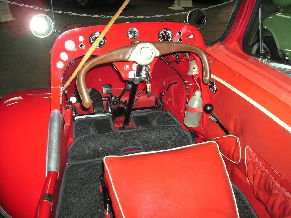 Messerschmitt Kabinenroller KR 200 (Innenleben)